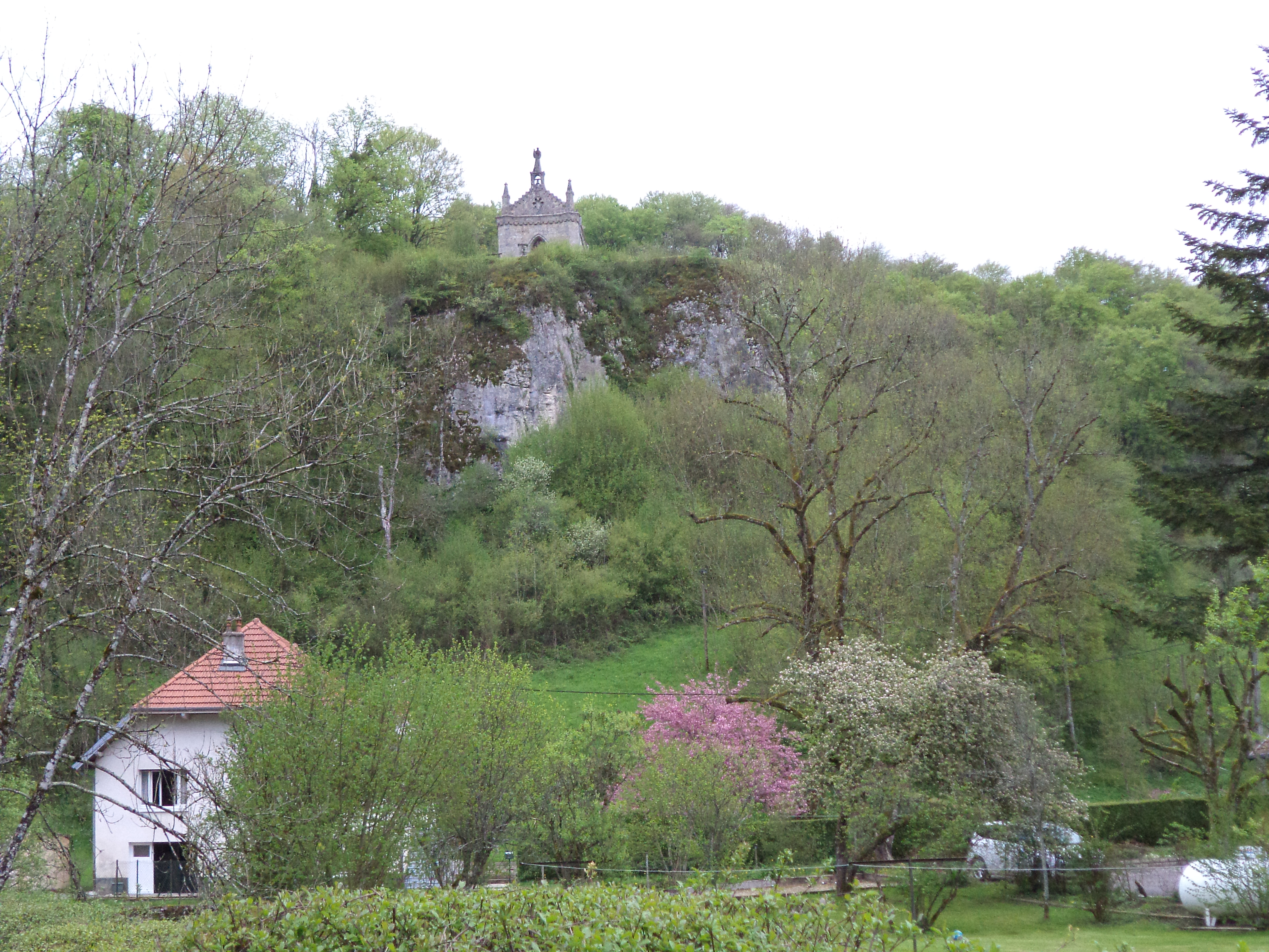 Saint-Ermenfroi-Chapelle un Cusance, Massif du Jura, Franche-Comté